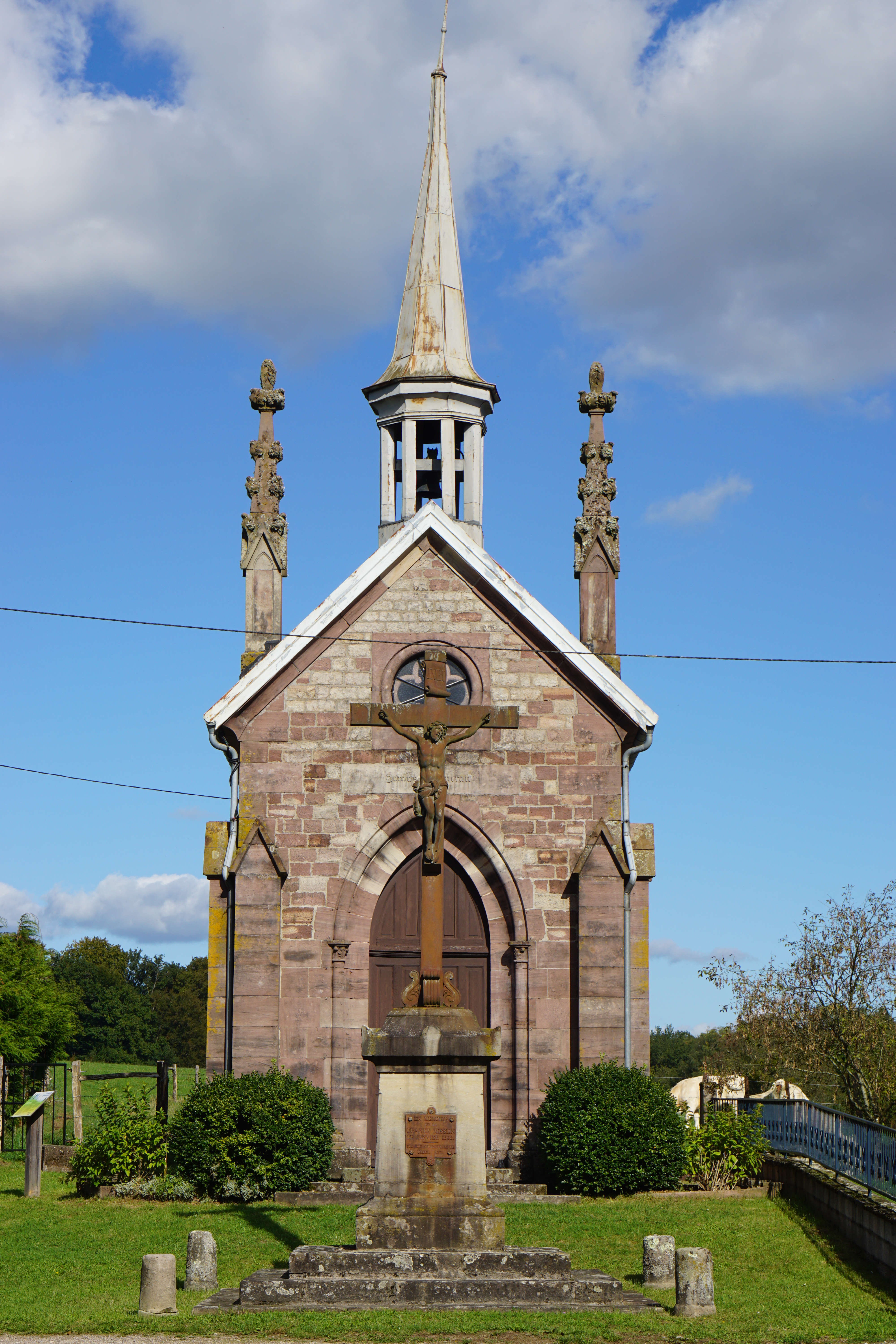 La chapelle Sainte-Pancras de Fontaine-lès-Luxeuil.